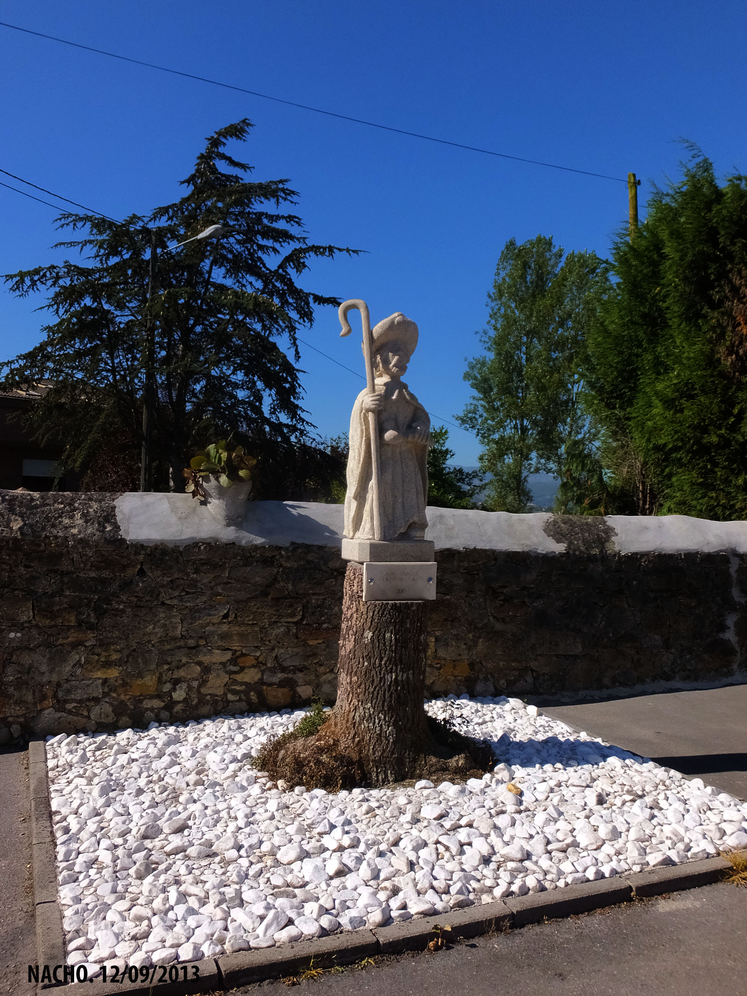 Santiago Apostol. La Bolgachina. La Manjoya. Oviedo